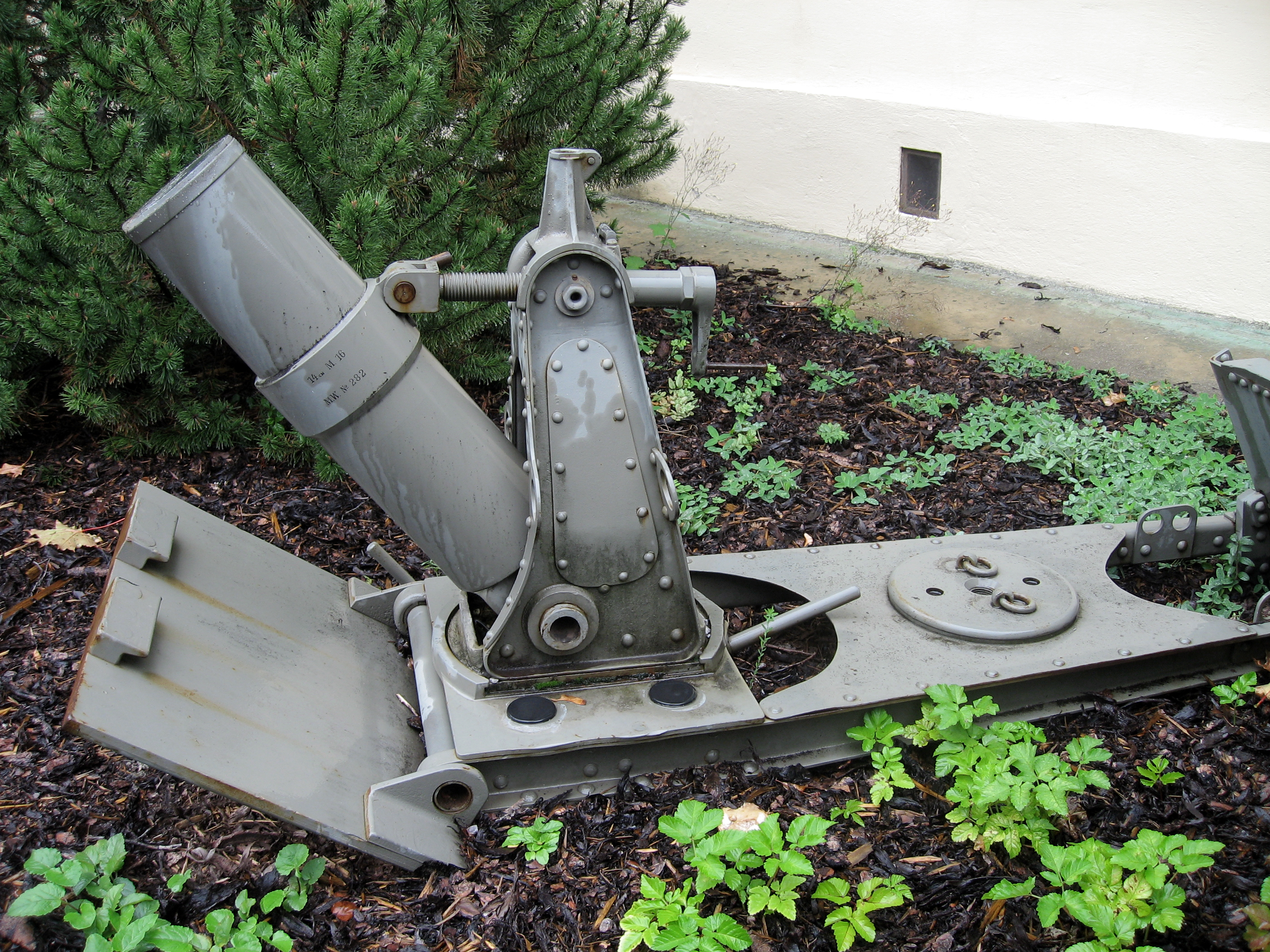 Österreich, Innsbruck, Bergisel, Tiroler Kaiserjägermuseum, Minenwerfer des ersten Weltkrieges der österreichisch ungarischen Armee, 14 cm M16